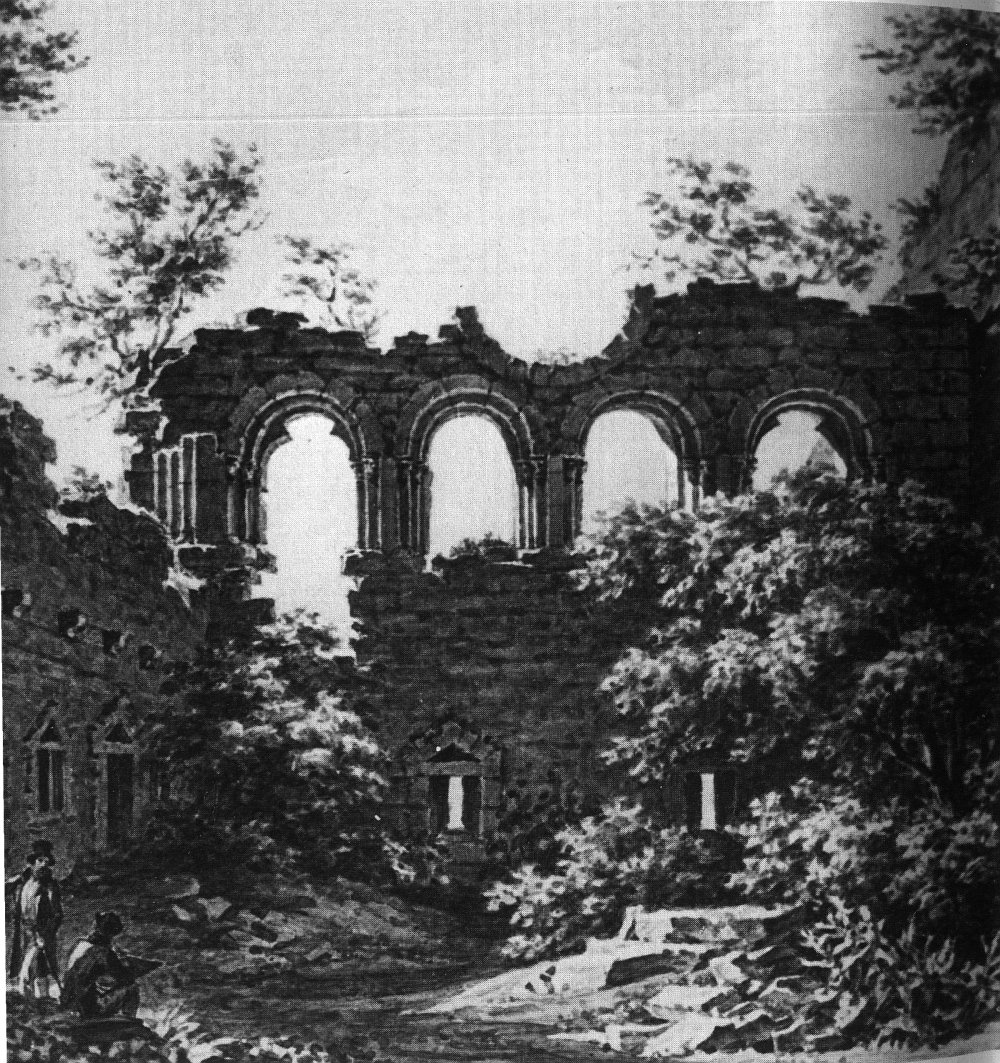 Palas von Girbaden, Aquarell von H. Imlin. Von den mit Burg Wildenberg im Odenwald vergleichbaren Fensterarkaden hat sich nur noch eine erhalten.